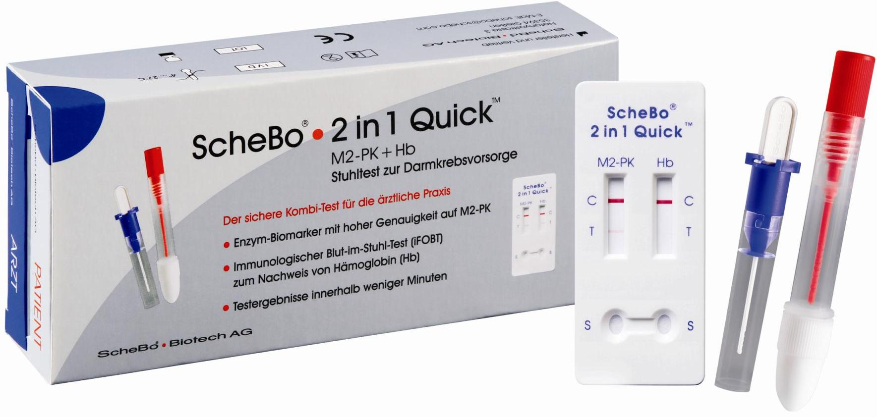 M2-PK Test